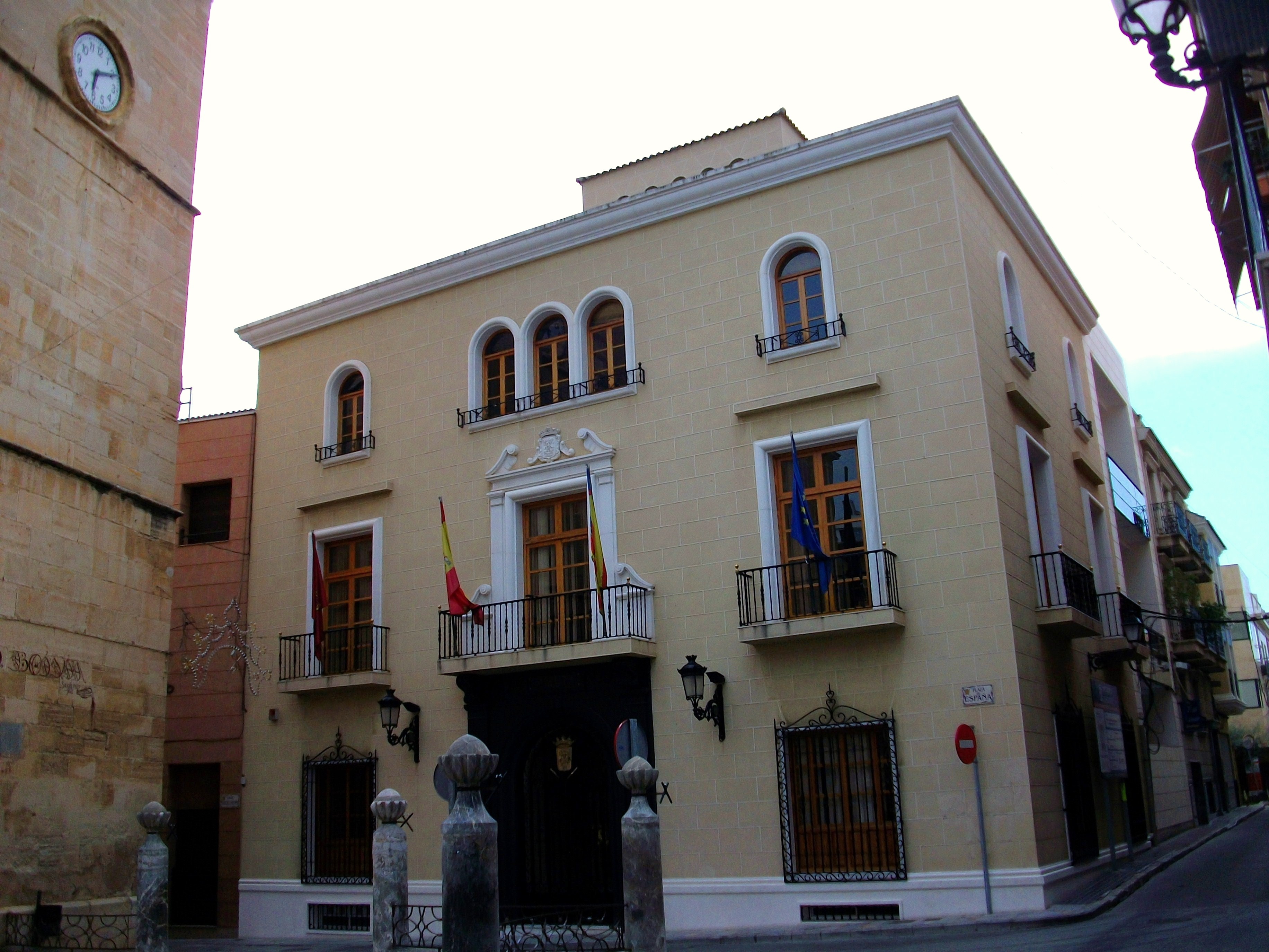 Ajuntament de Callosa de Segura, Baix Segura, País Valencià.